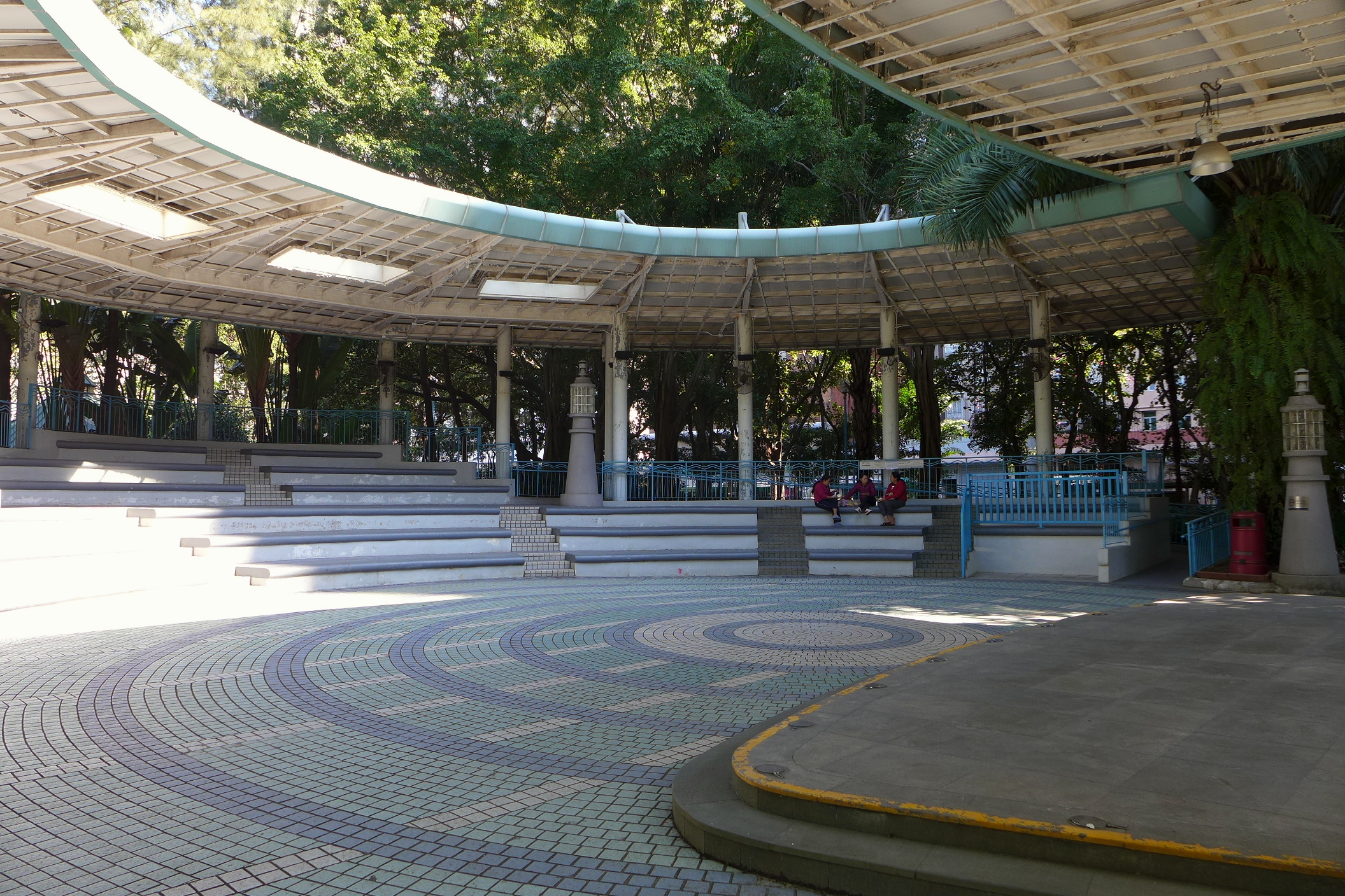 Belcher Bay Park Plaza